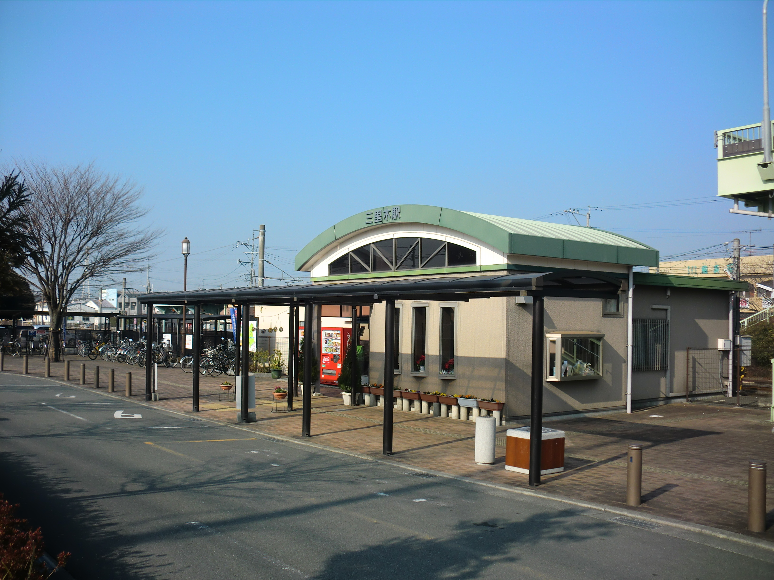 JR豊肥本線三里木（さんりぎ）駅